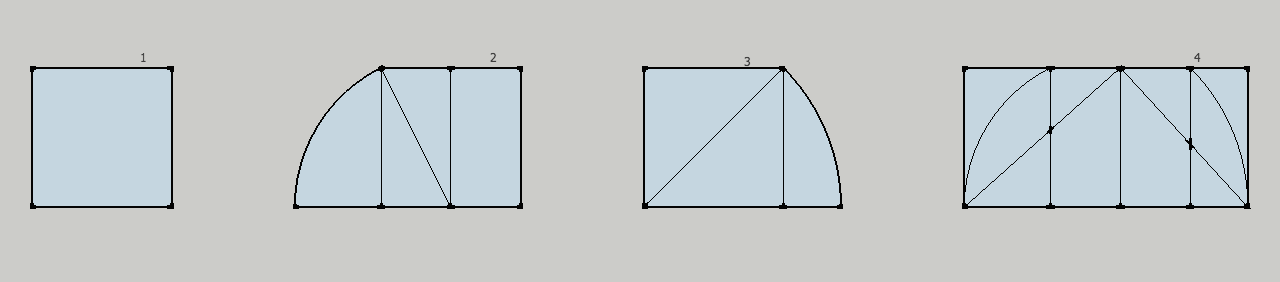 Le processus de construction du Modulor proposé par Hanning.